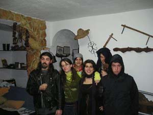 La imagen es de cámara propia.